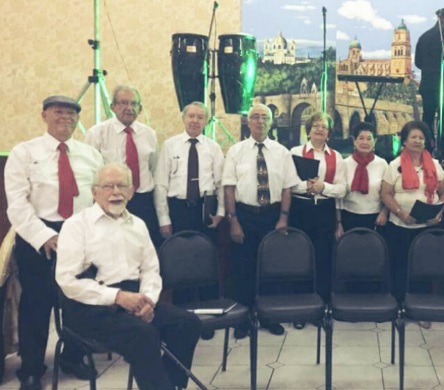 Evento realizado en la Casa España de San José.